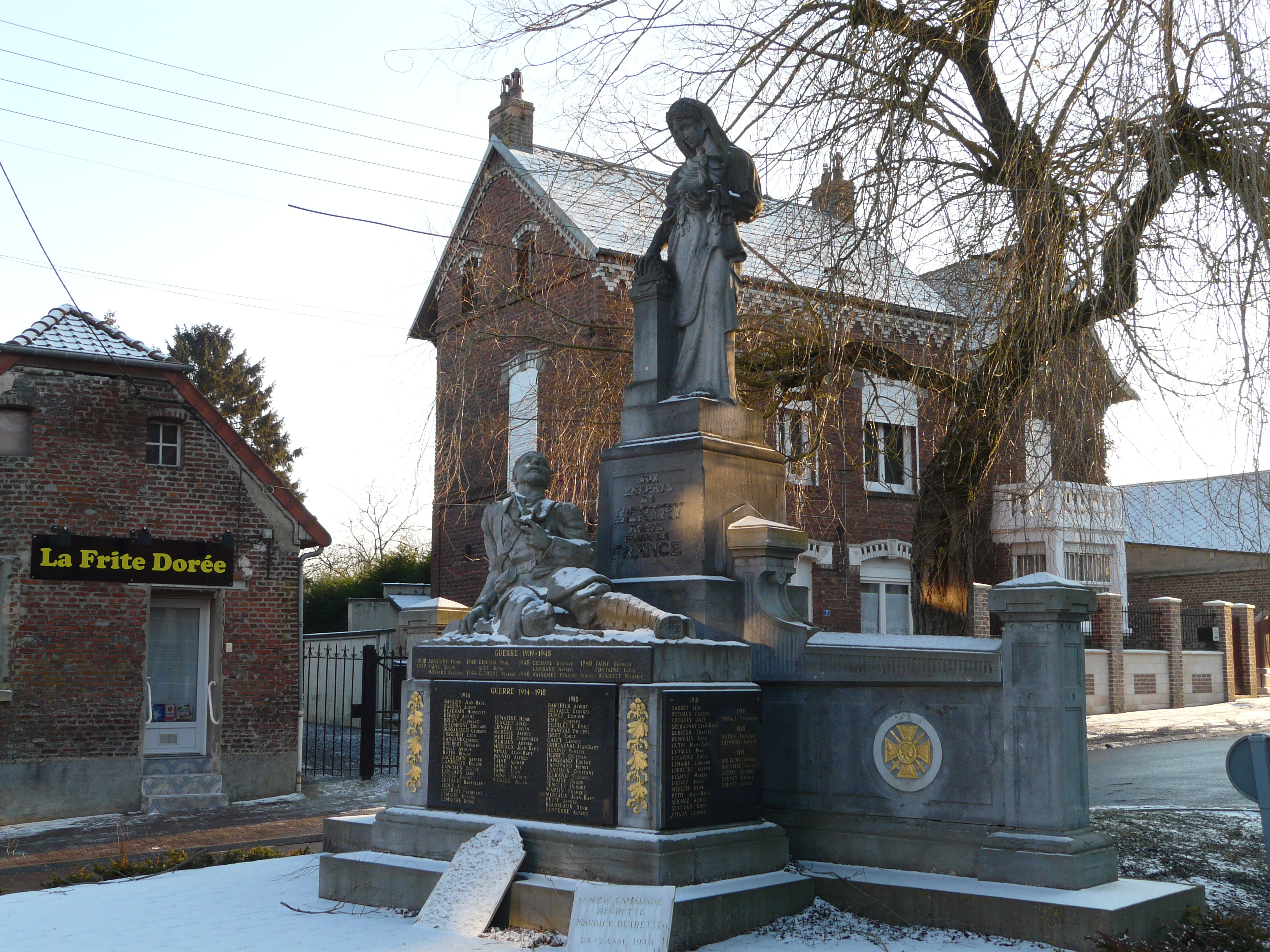 Monument aux morts des Première er Deuxième Guerres mondiales à Bertry (Nord)